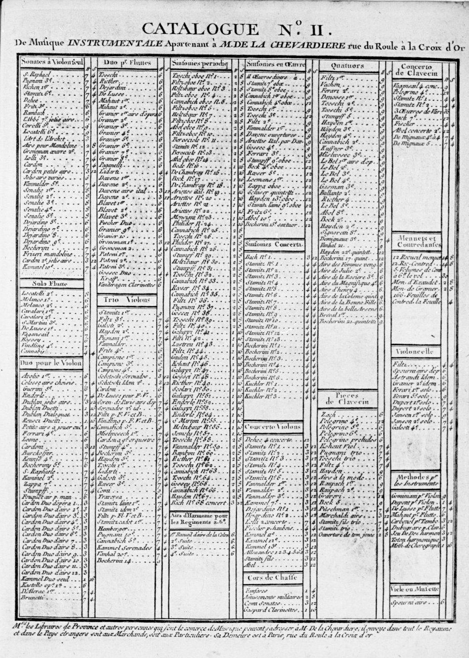 Catalogue instrumental de l'éditeur parisien La Chevardière (1775)